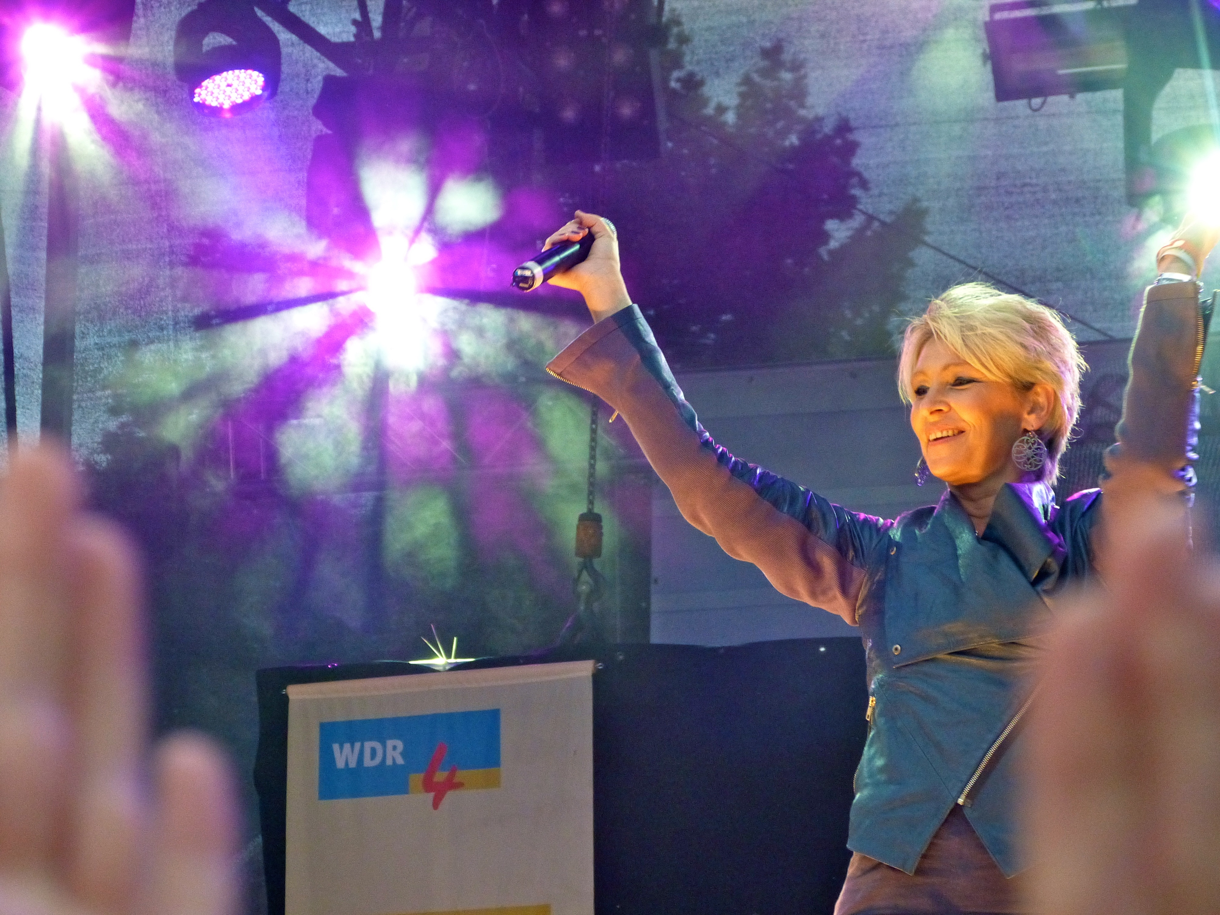 Claudia Jung während eines Auftritts beim CSD Köln 2012